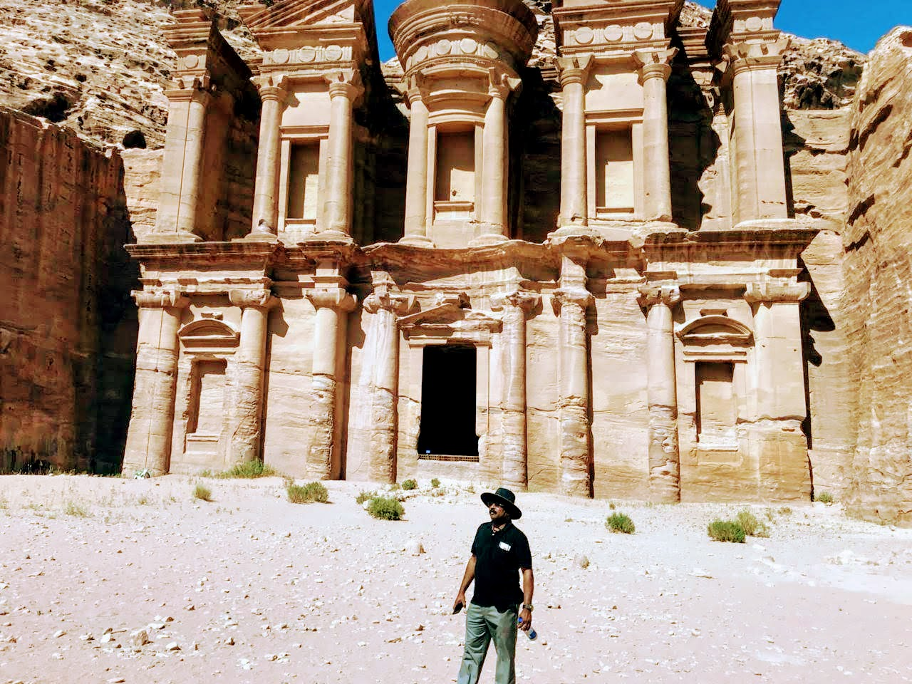 ആസ് ഡയർ എന്നറിയപ്പെടുന്ന മൊണാസ്ട്രിക്ക്‌ മുന്നിൽ ..!